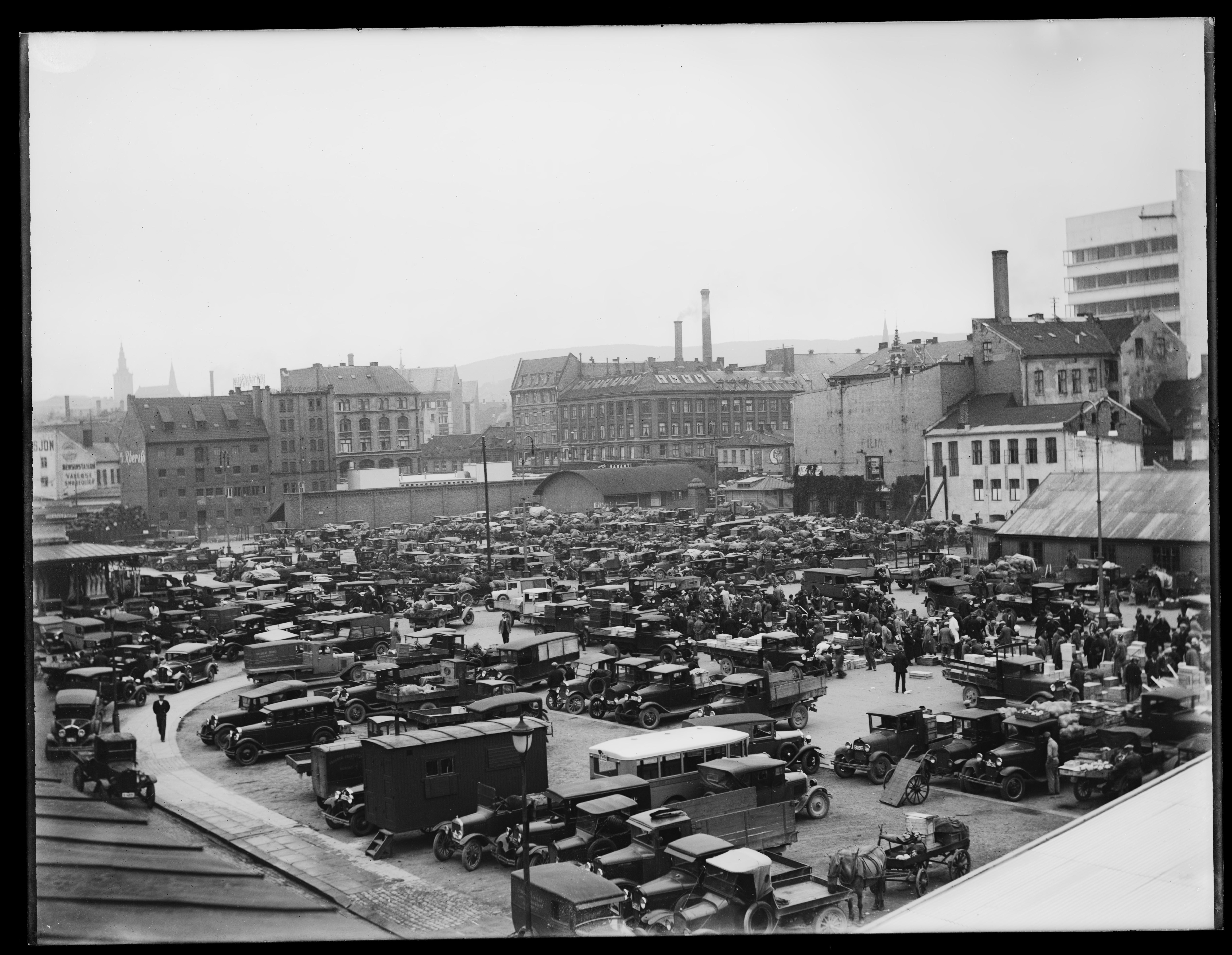 Bildet er hentet fra Nasjonalbibliotekets bildesamling. Anmerkninger til bildet var: Påskrift arkivark: Grønlands Torv, Torvdirektøren Eldste arkivnummer: 1081 Grønland,Oslo, Oslo, Oslo